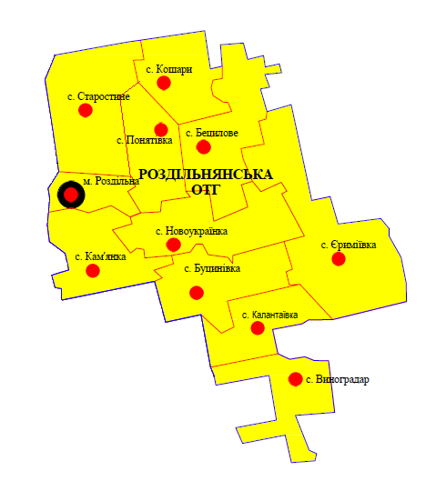 Схема Раздельнянской объединённой территориальной громады